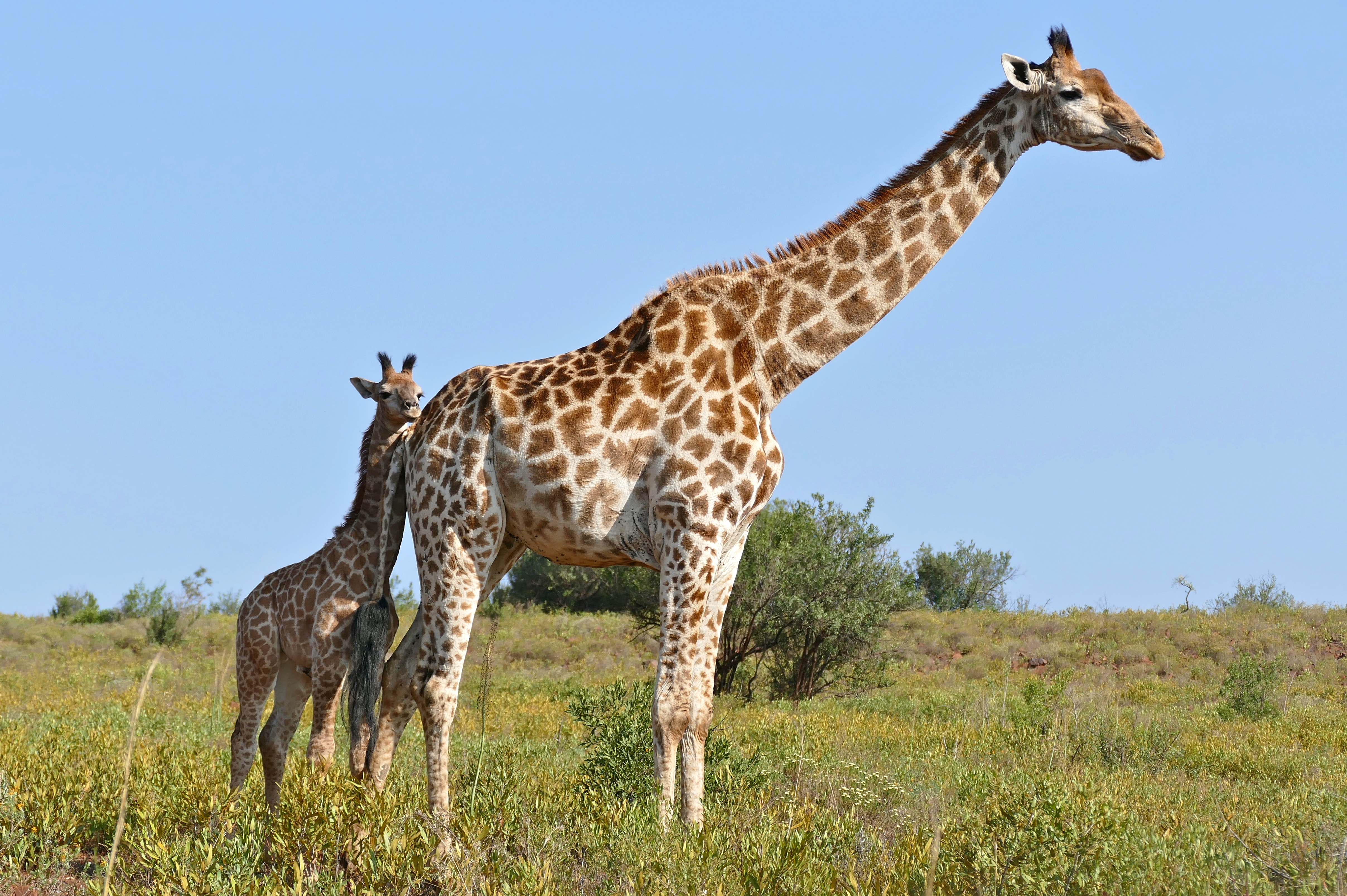 Kwankosazana Loop, Ithala Game Reserve, KwaZulu-Natal, SOUTH AFRICA